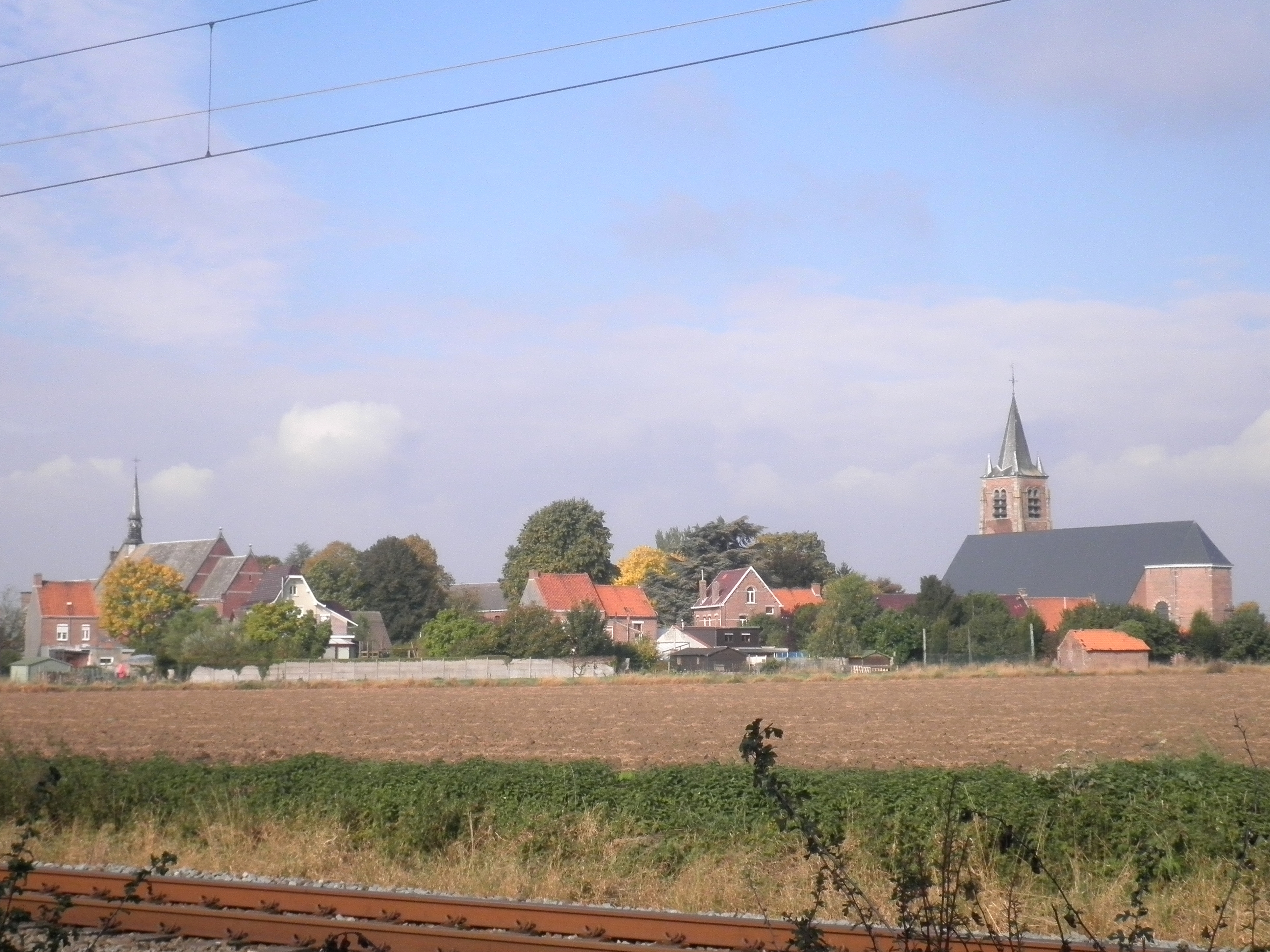 Blandain vu de la voie de chemin de fer (rue du Pont des Bénédictines)